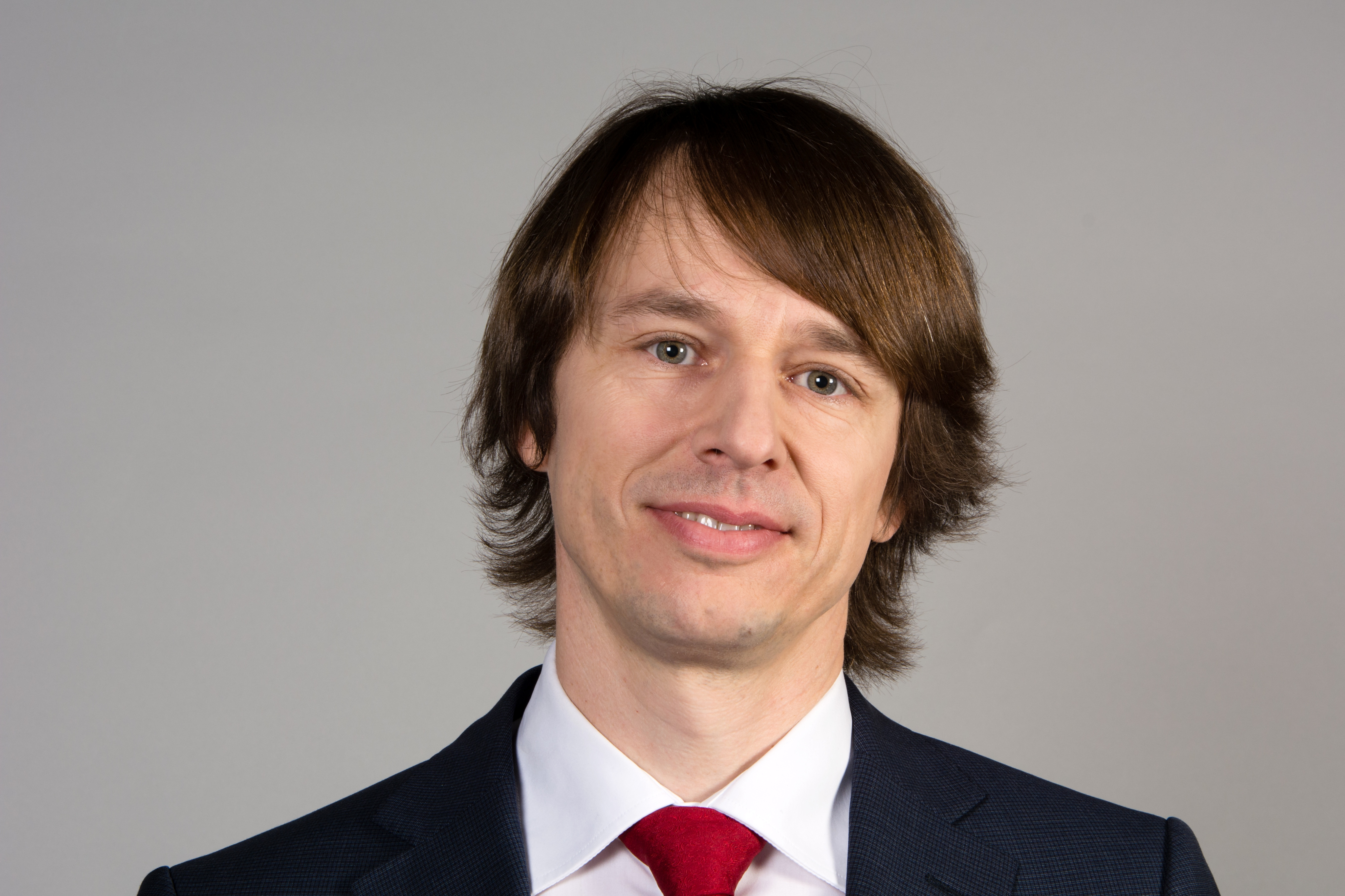 Edvard Kožušník, Tschechien, 2014 Mitglied des Europäischen Parlaments